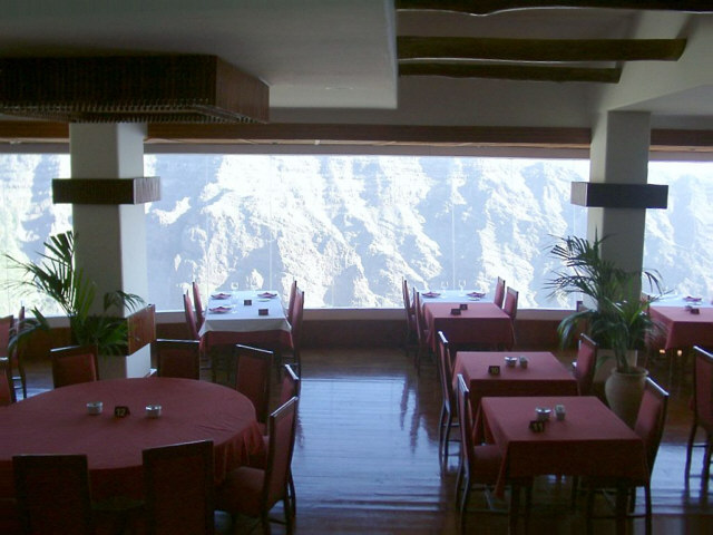 La Gomera, Blick aus dem Restaurant am Aussichtspunkt Mirador del Palmerejeo, Valle Gran Rey